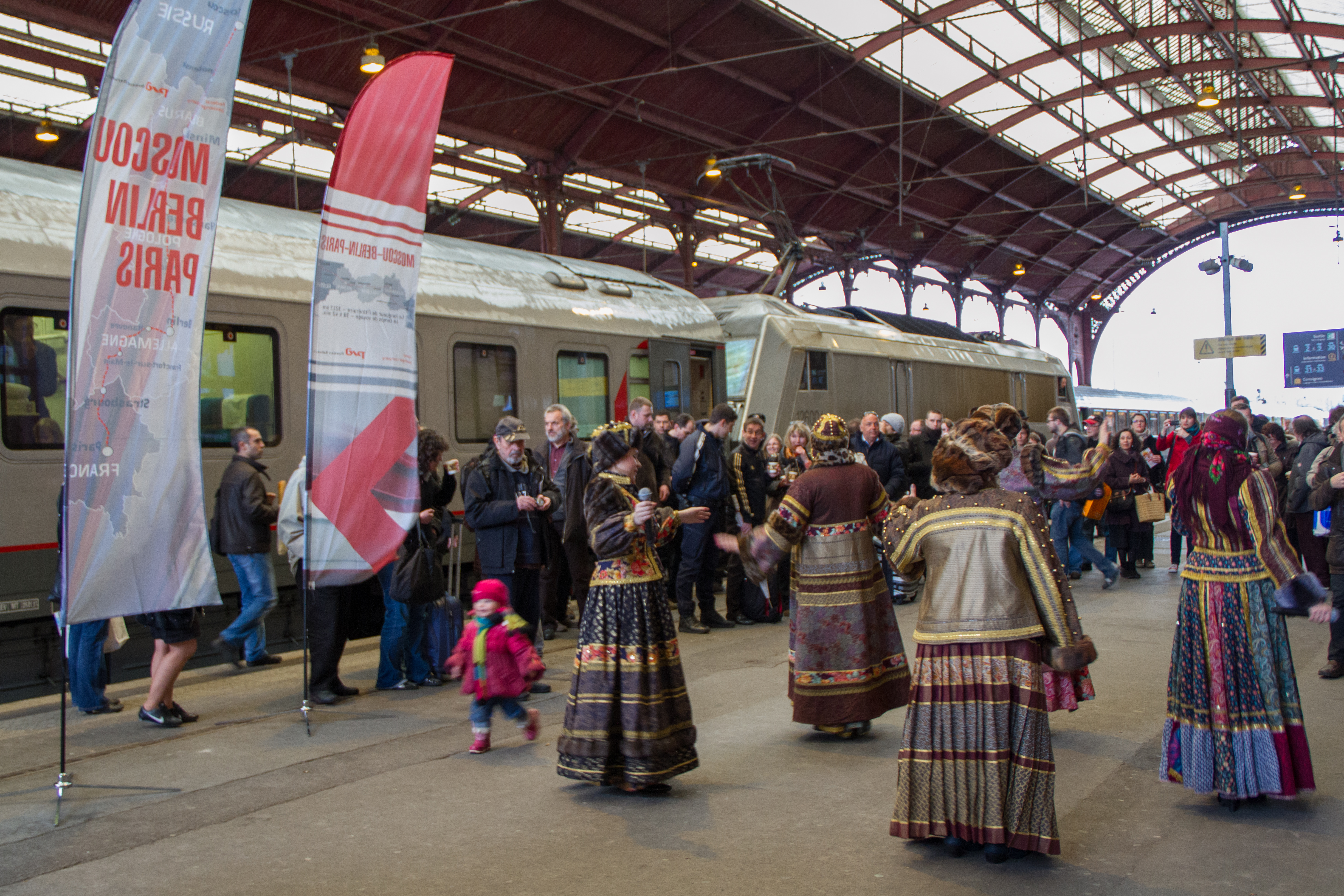 Inauguration de la liaison ferroviaire Paris-Strasbourg-Moscou en gare de Strasbourg le 9 avril 2013.